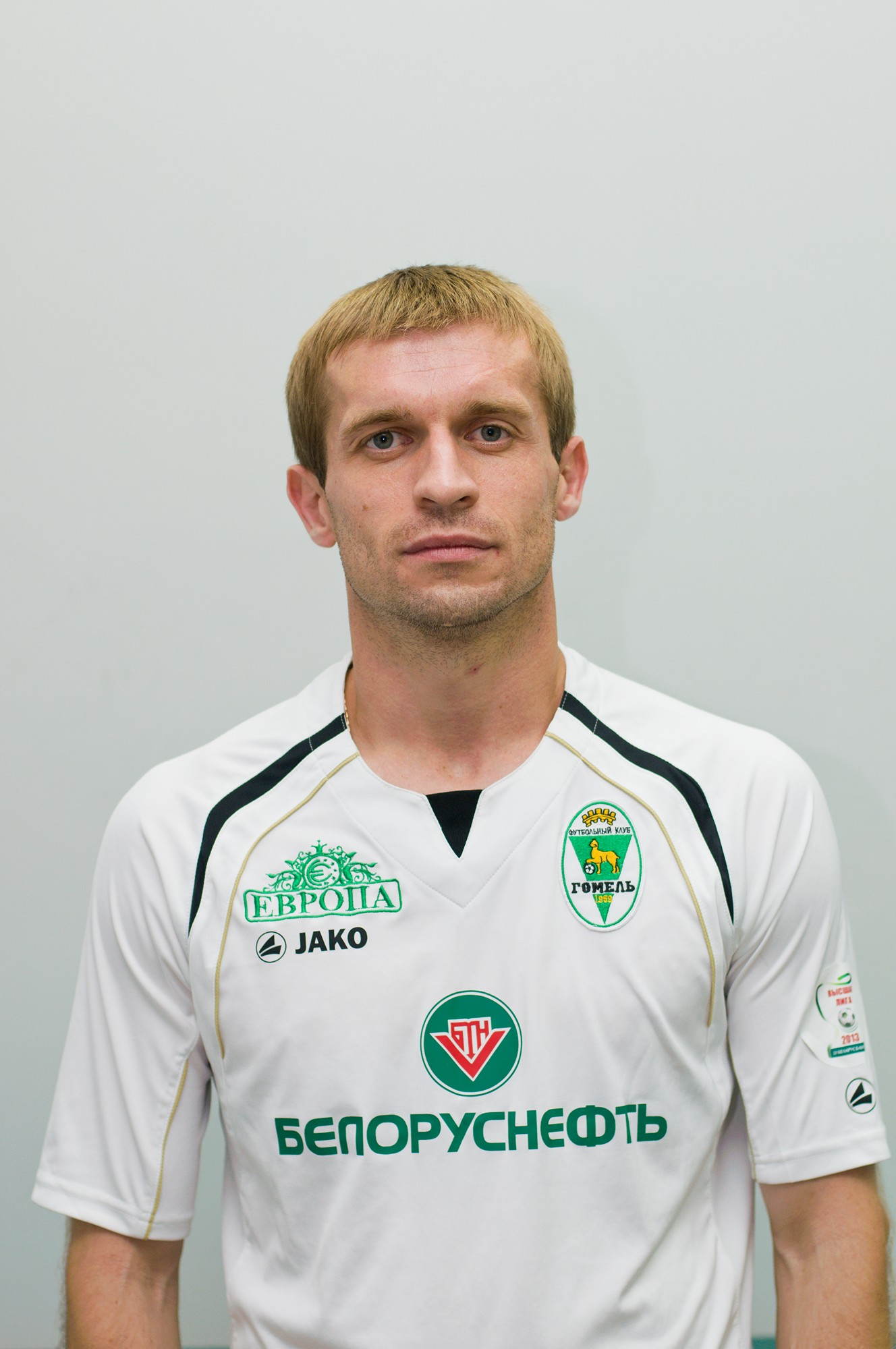 Гена Близнюк